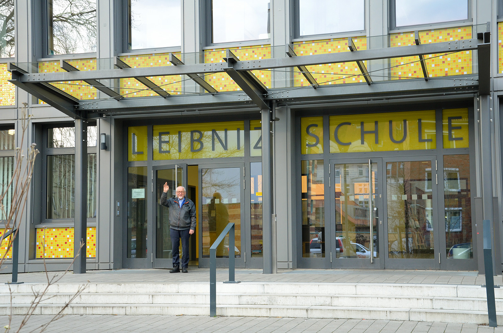 Der pensionierte Ingenieur Helmut Konietzny am Eingang zur Leibnizschule Hannover, um hier den Elektronikkurs für Kinder, gefördert vom Verein ForscherGeist e.V., Verein zur Förderung junger Forscher, abzuhalten ...